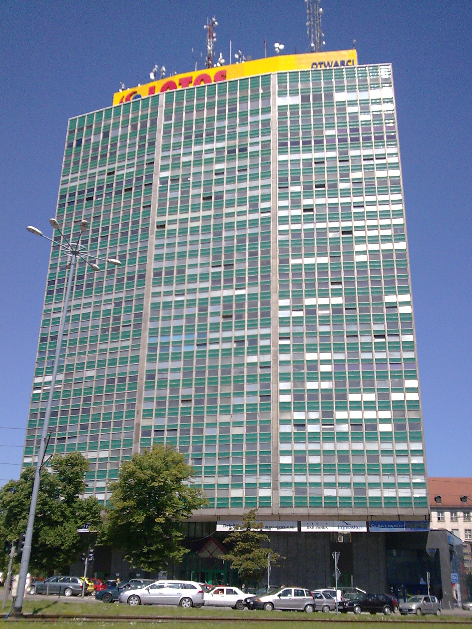 Drapacz chmur " Zieleniak " w centrum Gdańska